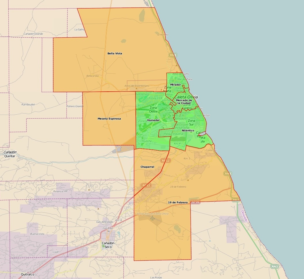 Distritos de Caleta Olivia en el ejído urbano. En verde los urbanos, en anaranjado los rurales. This map may be incomplete, and may contain errors. Don't rely solely on it for navigation.